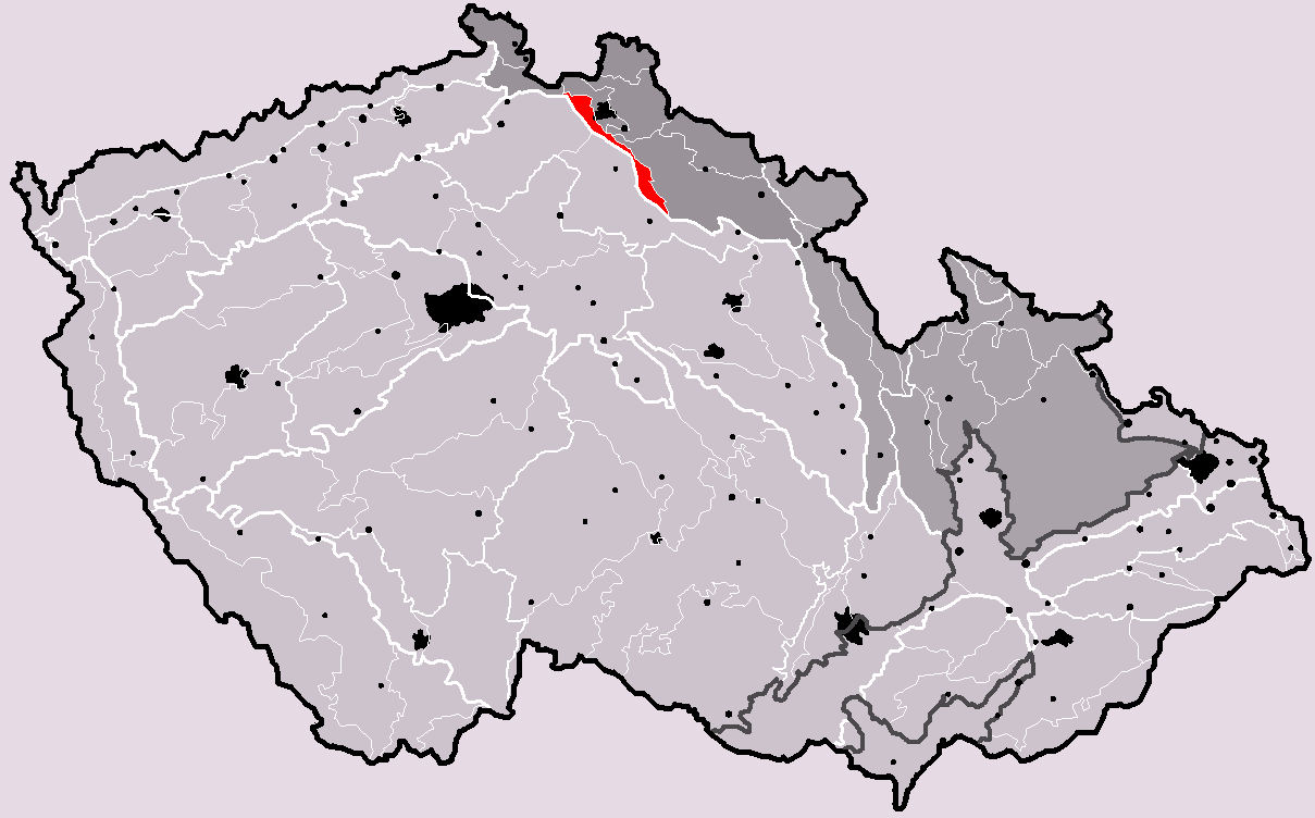 Poloha geomorfologického celku Ještědsko-kozákovský hřbet v rámci České republiky. Hercynský systém Hercynská pohoří I Česká vysočina I4 (IV) Krkonošsko-jesenická subprovincie I4A (IVA) Krkonošská oblast I4A-3 (IVA-3) Ještědsko-kozákovský hřbet